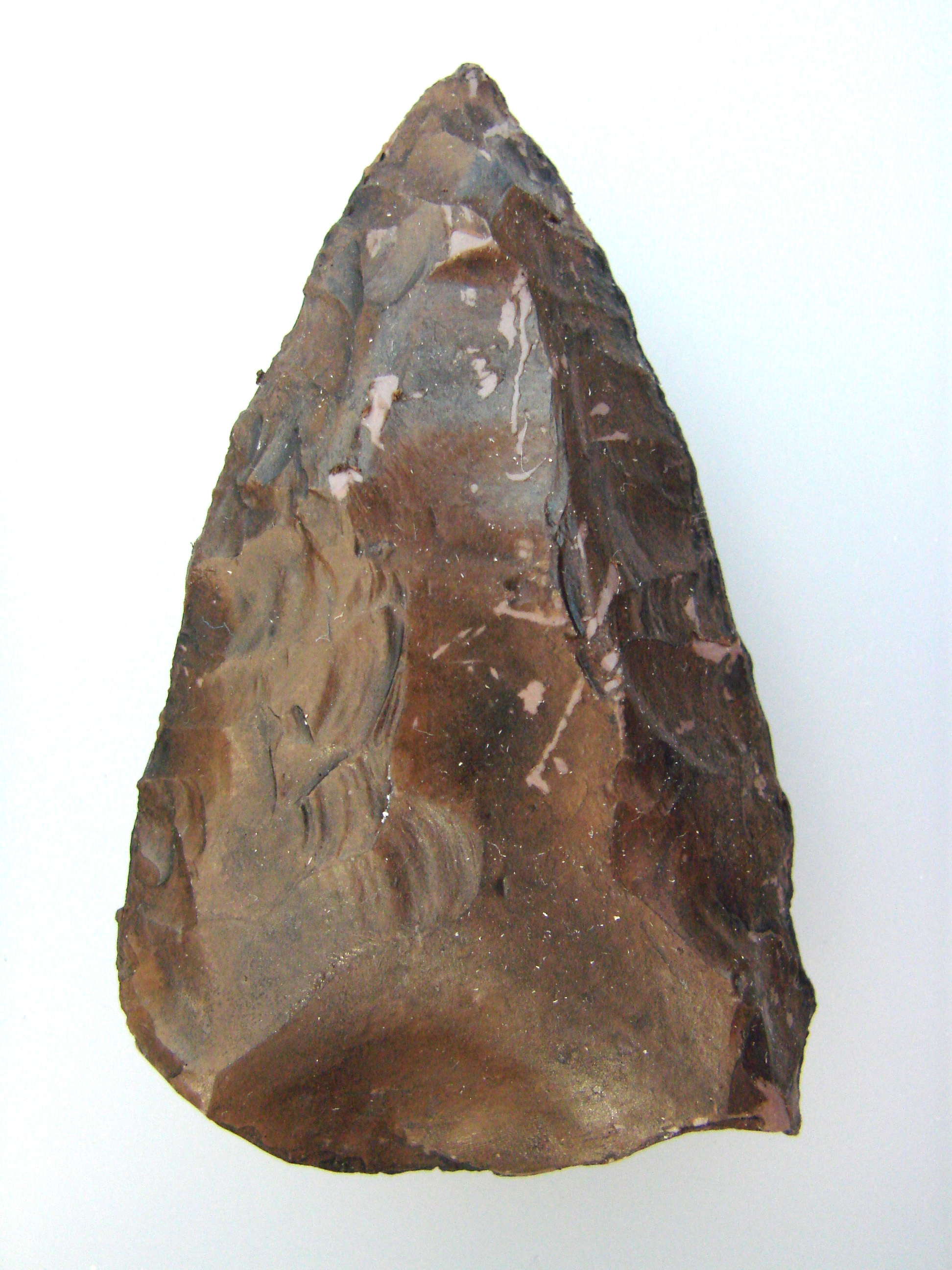 Muséum d'Anthropologie, campus universitaire d'Irchel, Université de Zurich (Suisse) : outil de culture moustérienne, technique Levallois. Trouvé en Syrie.